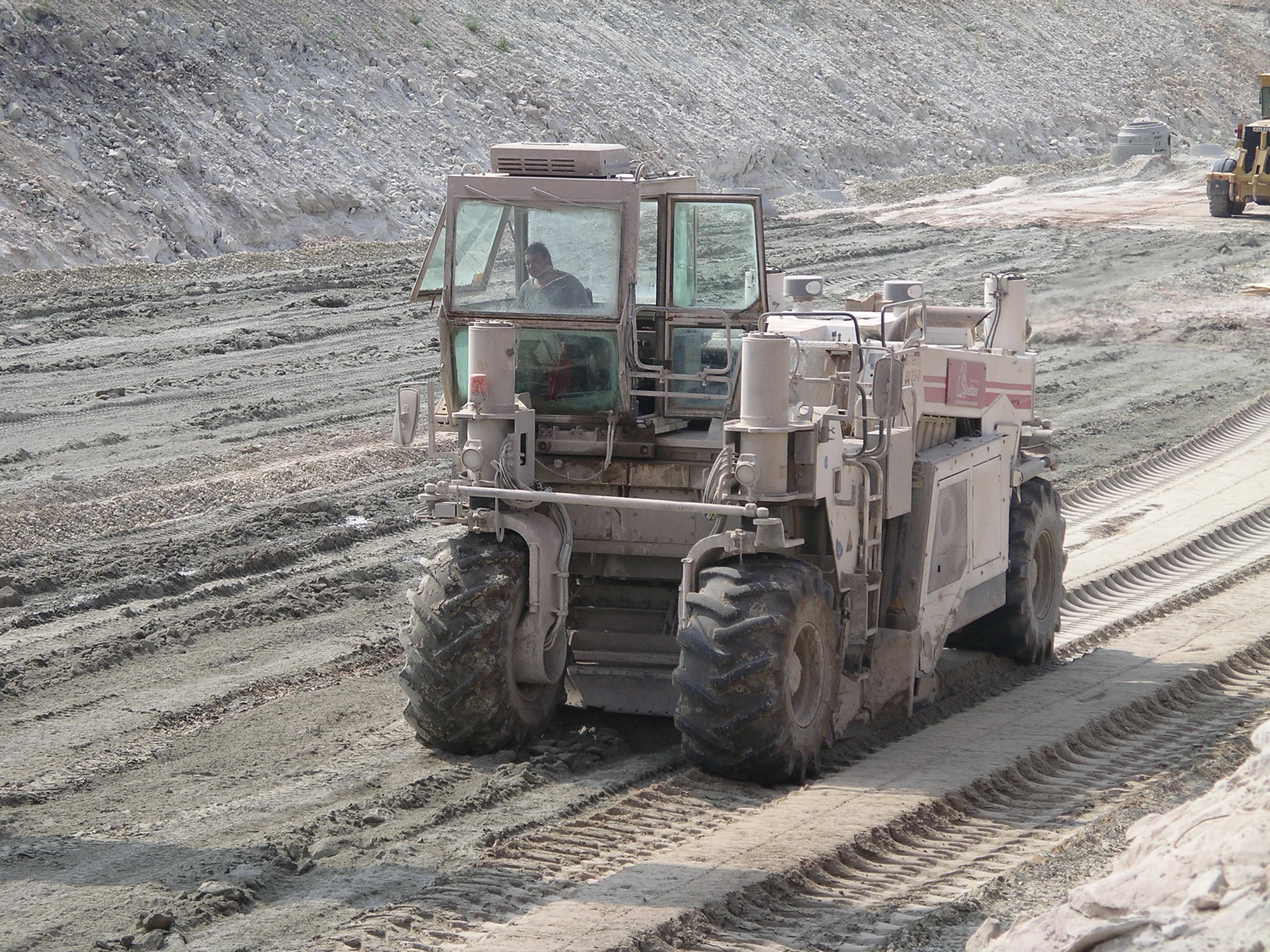 Selbstfahrende Arbeitsmaschine zur Bodenverbesserung für die Fahrbahn der Bundesautobahn BAB A73 bei BW57-1, Brücke bei Zeickhorn, Landkreis Coburg, Germany